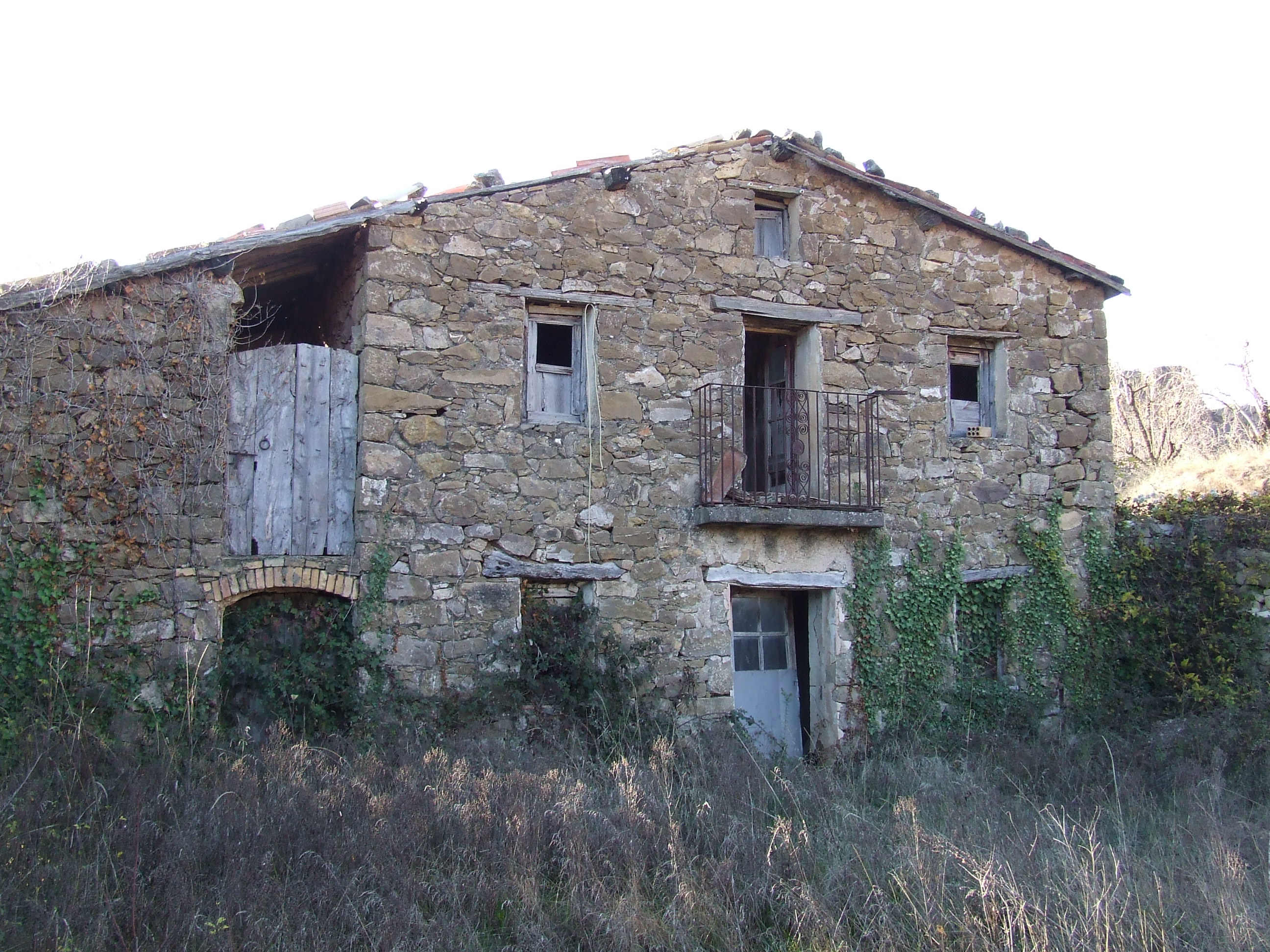 Casa Montsor de Ço del Jou (Abella de la Conca, Pallars Jussà)